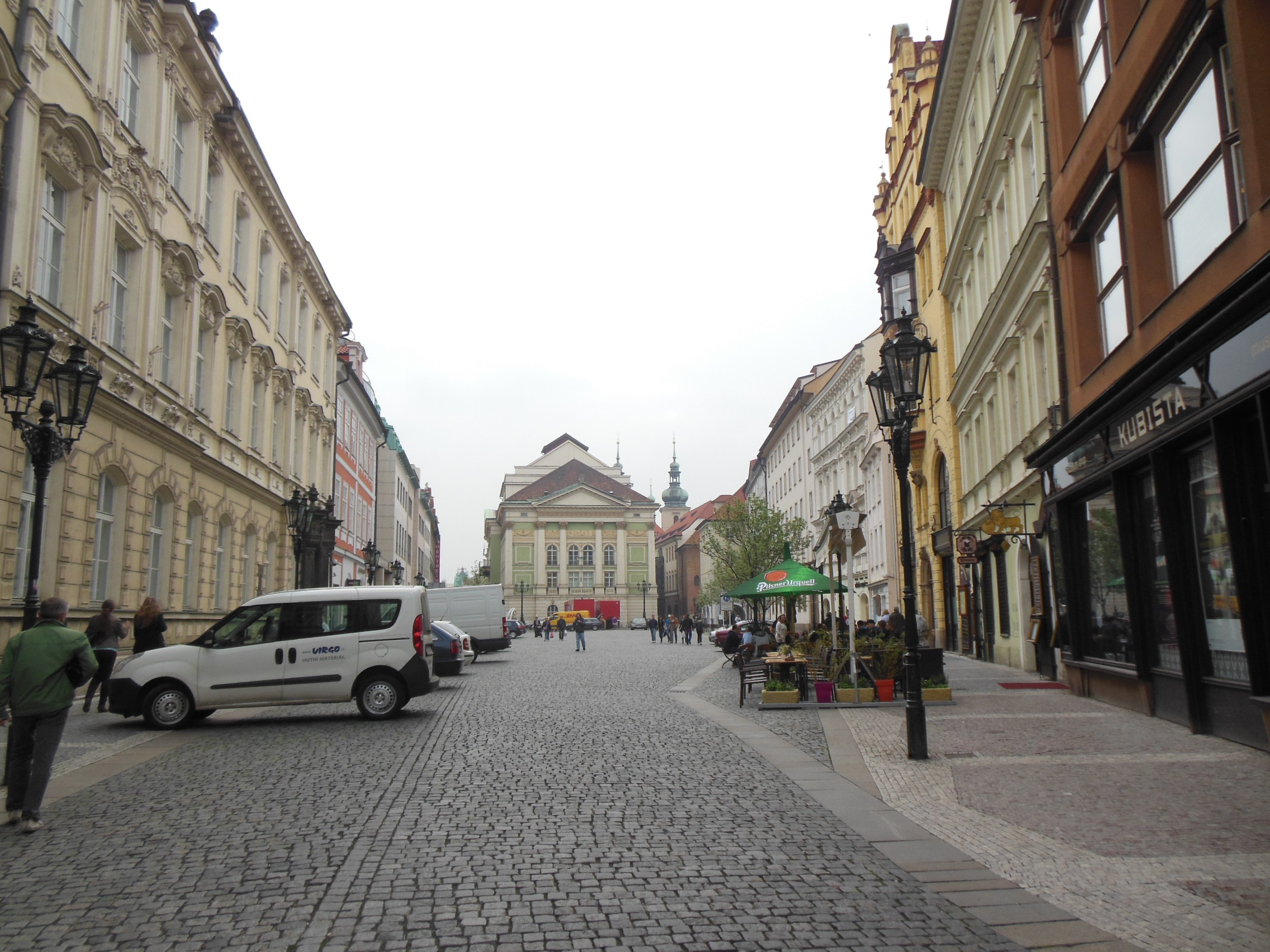 Náměstí Ovocný trh v Praze.